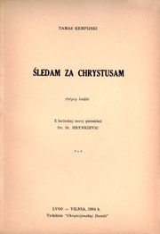 Тытул выдання кнігі Тамаша Кемпійскага «Следам за Хрыстом» на беларускай мове ў перакладзе Станіслава Грынкевіча. Львоў–Вільня, 1934 г.